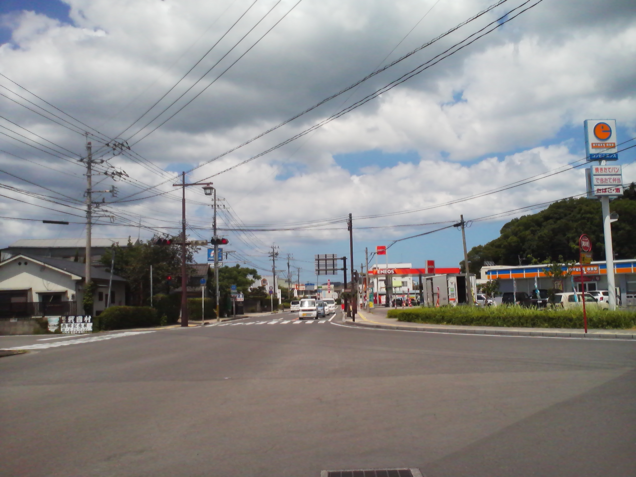 鹿児島県道44号京泊大小路線を宮内交差点から京泊方面を望む。